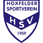 Vereinswappen Hoxfelder Sportverein 1959 e.V.